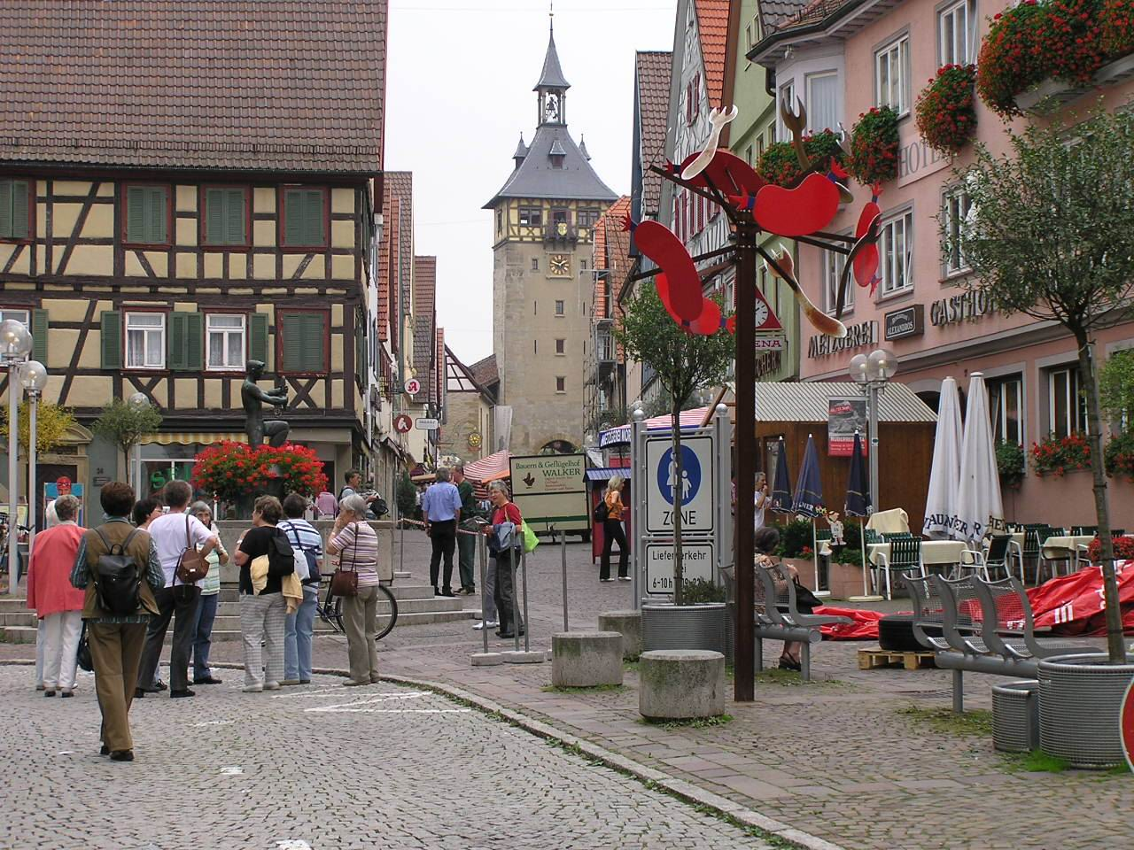 Wilder-Mann-Brunnen in der Altstadt von MarbachRomână: Fântâna „Wilder-Mann“ în oraşul vechi al Marbachului